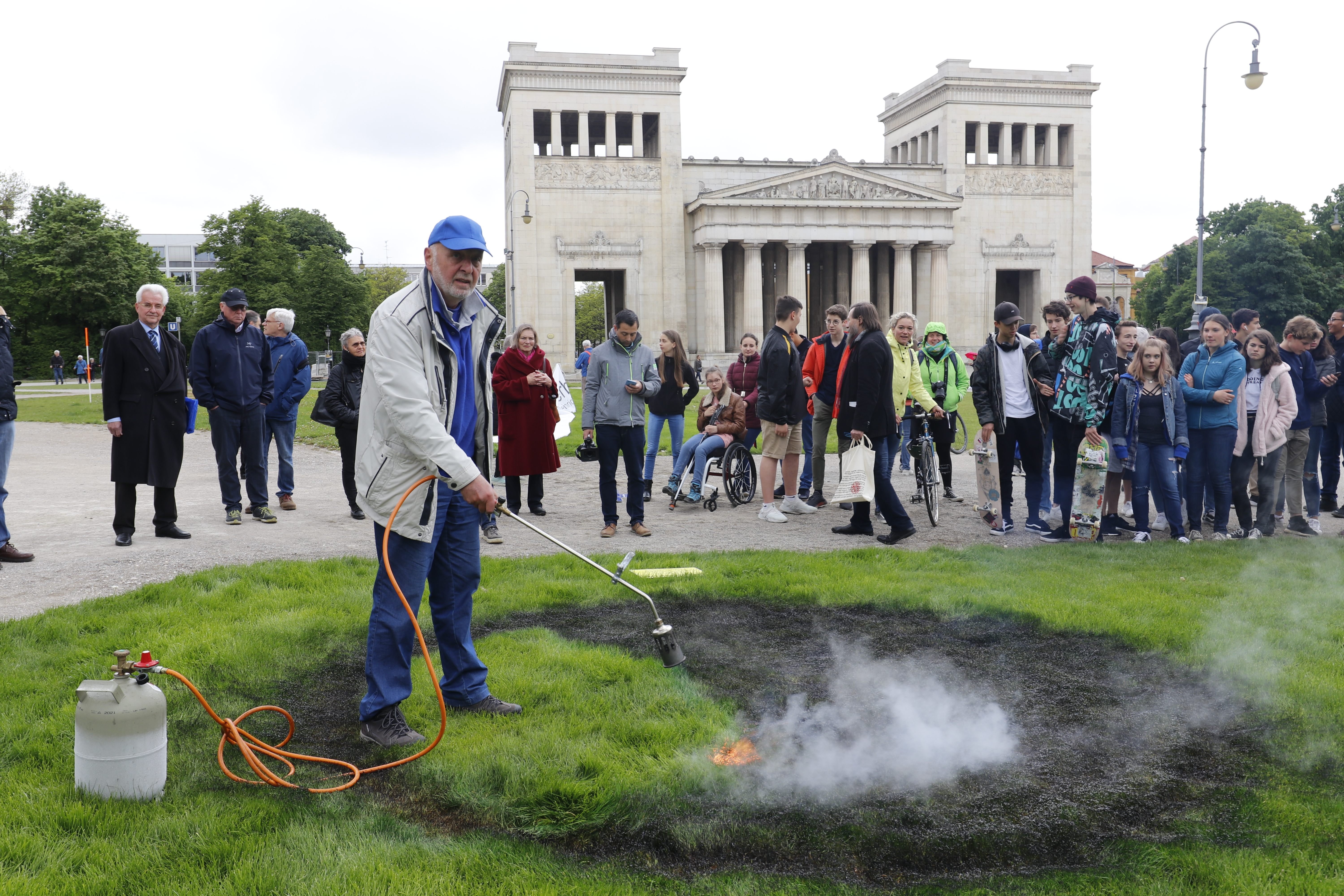 Der Münchner Aktionskünstler Wolfram Kastner erzeugt die "Brandspuren" auf dem Münchner Königsplatz, um an die Bücherverbrennung durch die Nazis am 10. Mai 1933 zu erinnern.